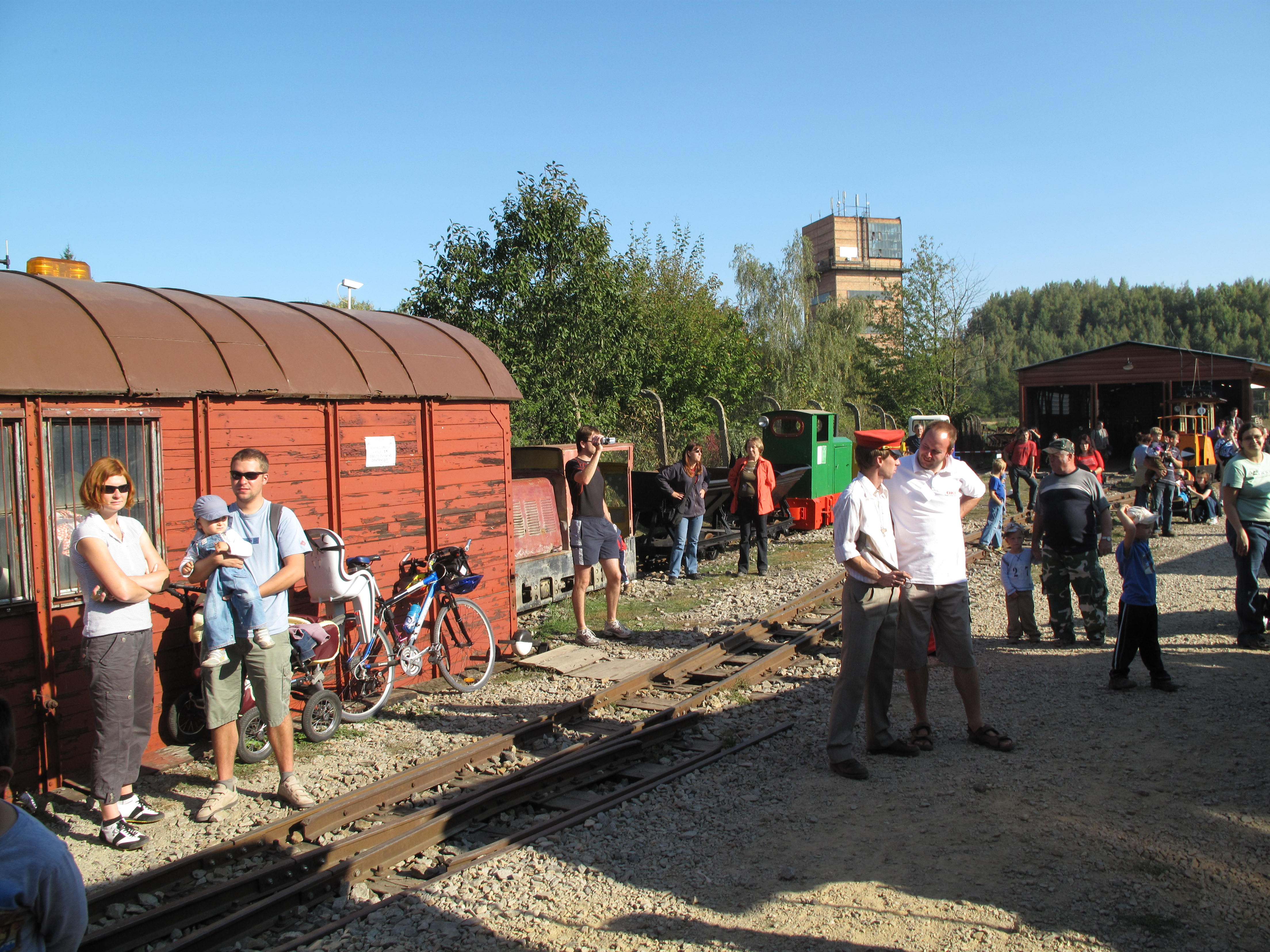 Muzeum průmyslových železnic